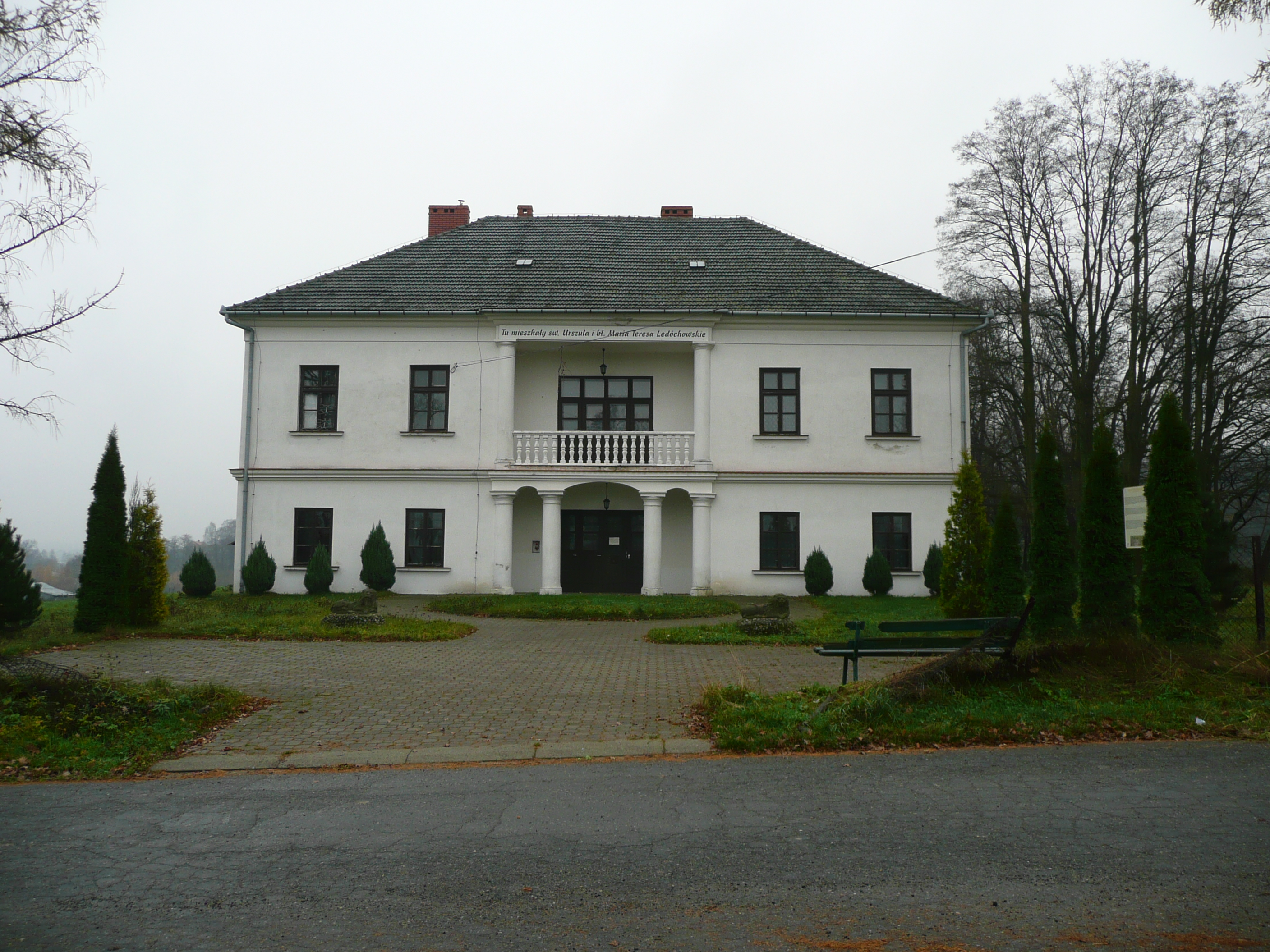 Dwór Ledóchowskich